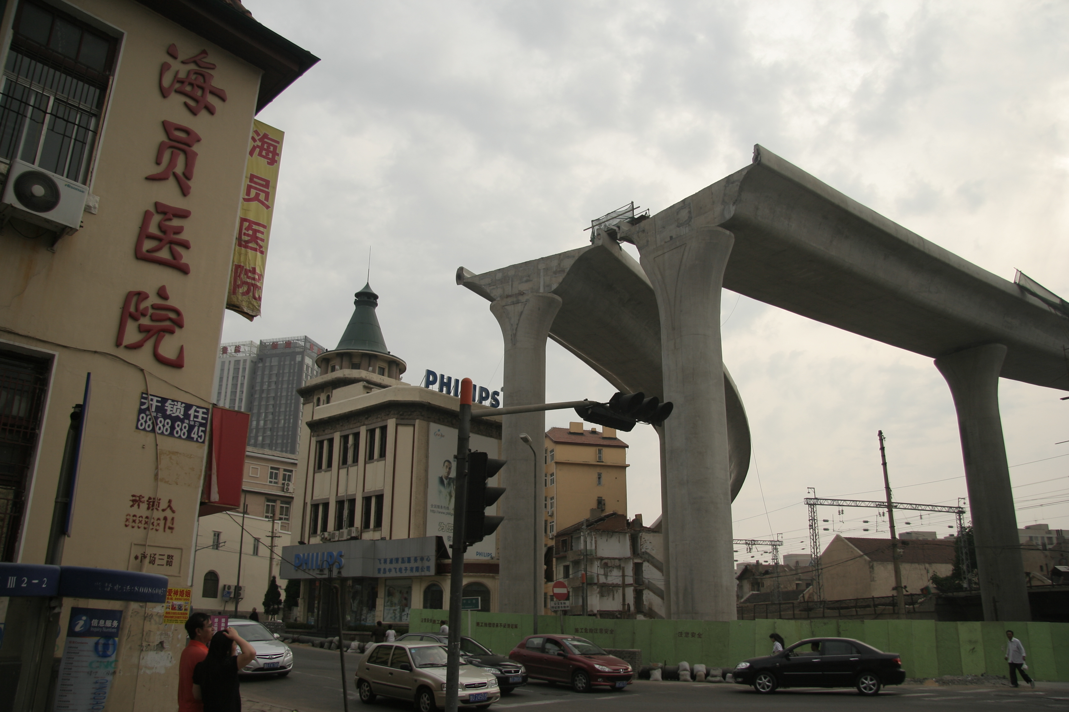 建设中的桥